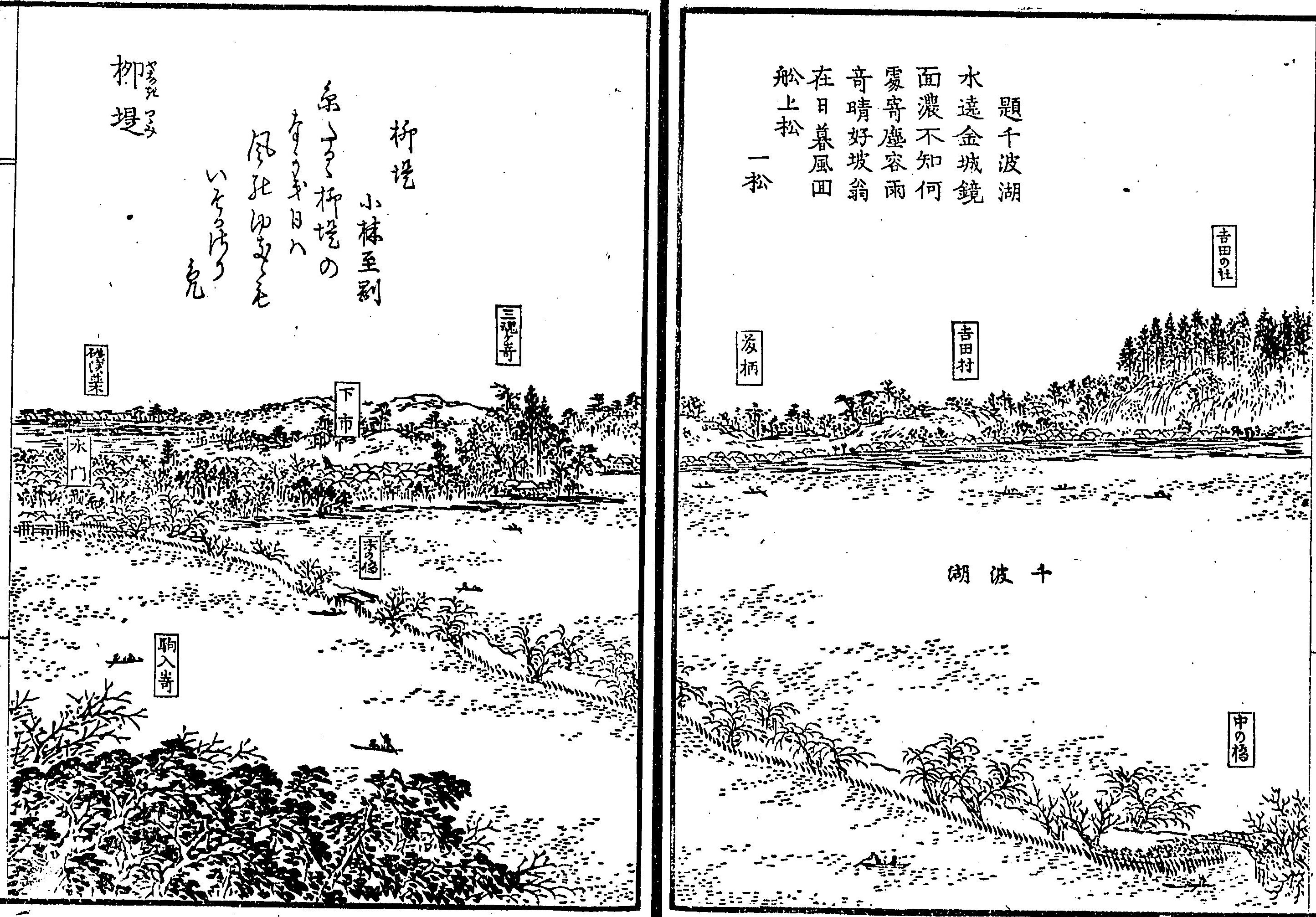 千波湖の図/柳堤(『茨城常盤公園攬勝図誌』松平俊雄 著 YDM23693 (マイクロフィッシュ) )コマ番号88 改編 [ 国立国会図書館デジタルコレクション:インターネット公開（保護期間満了）]